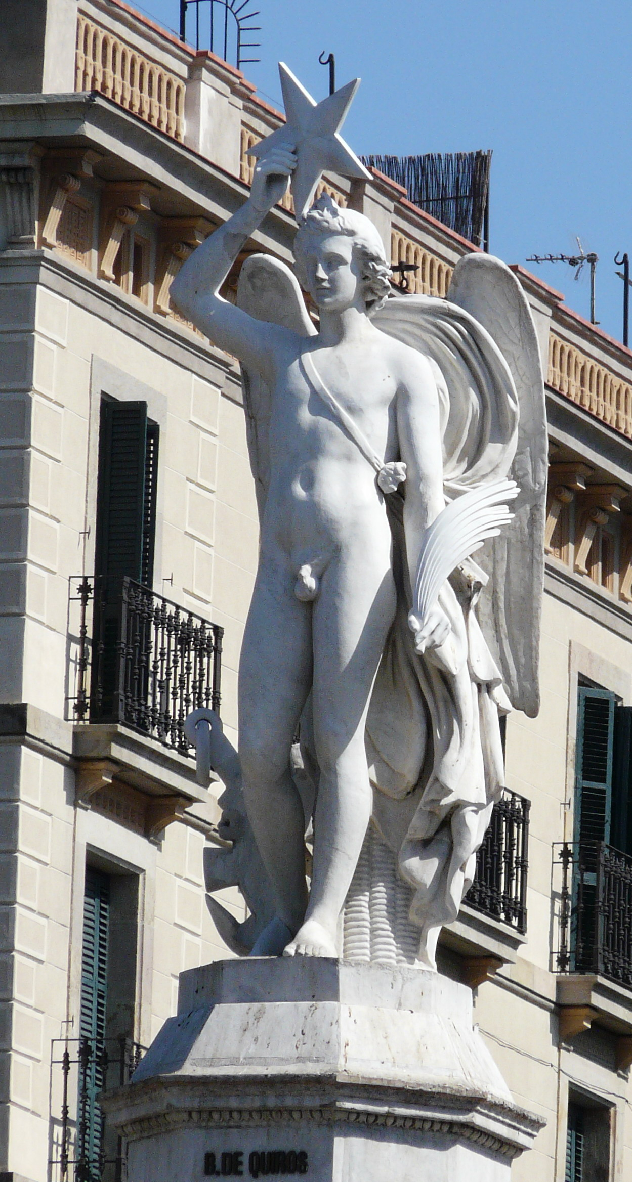 Font del Geni Català (Barcelona)